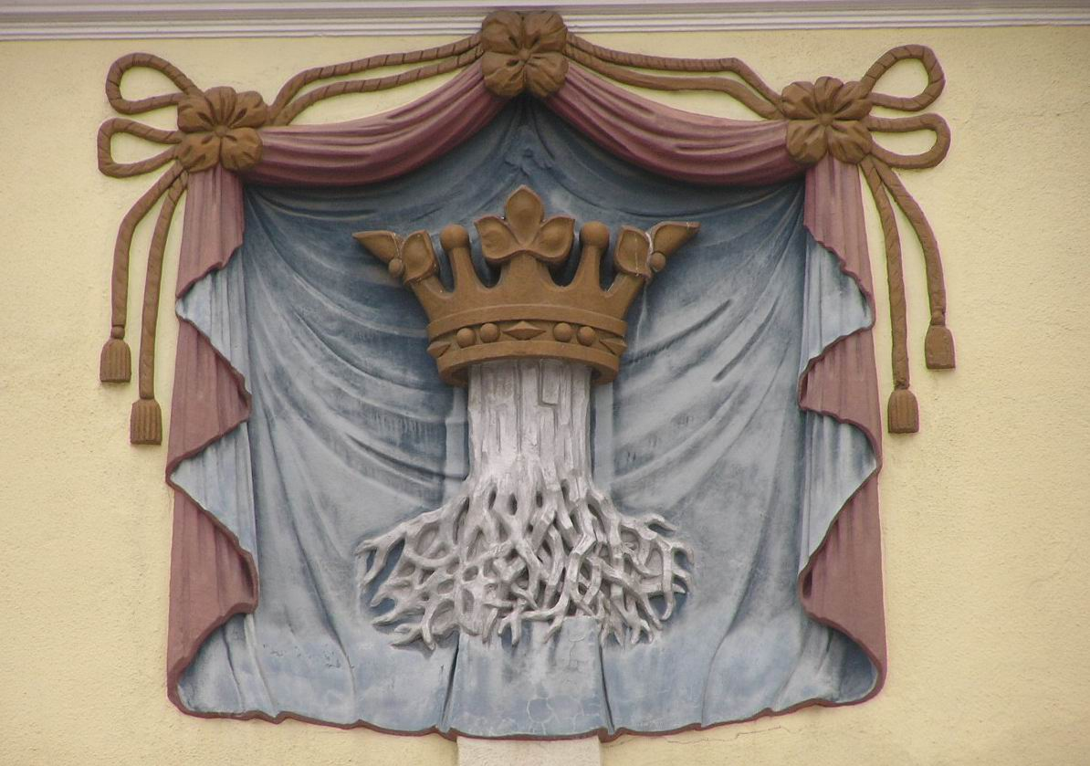 Wappen von Brașov/Kronstadt, angebracht am Alten Rathaus Kronstadts, Siebenbürgen, Rumänien.